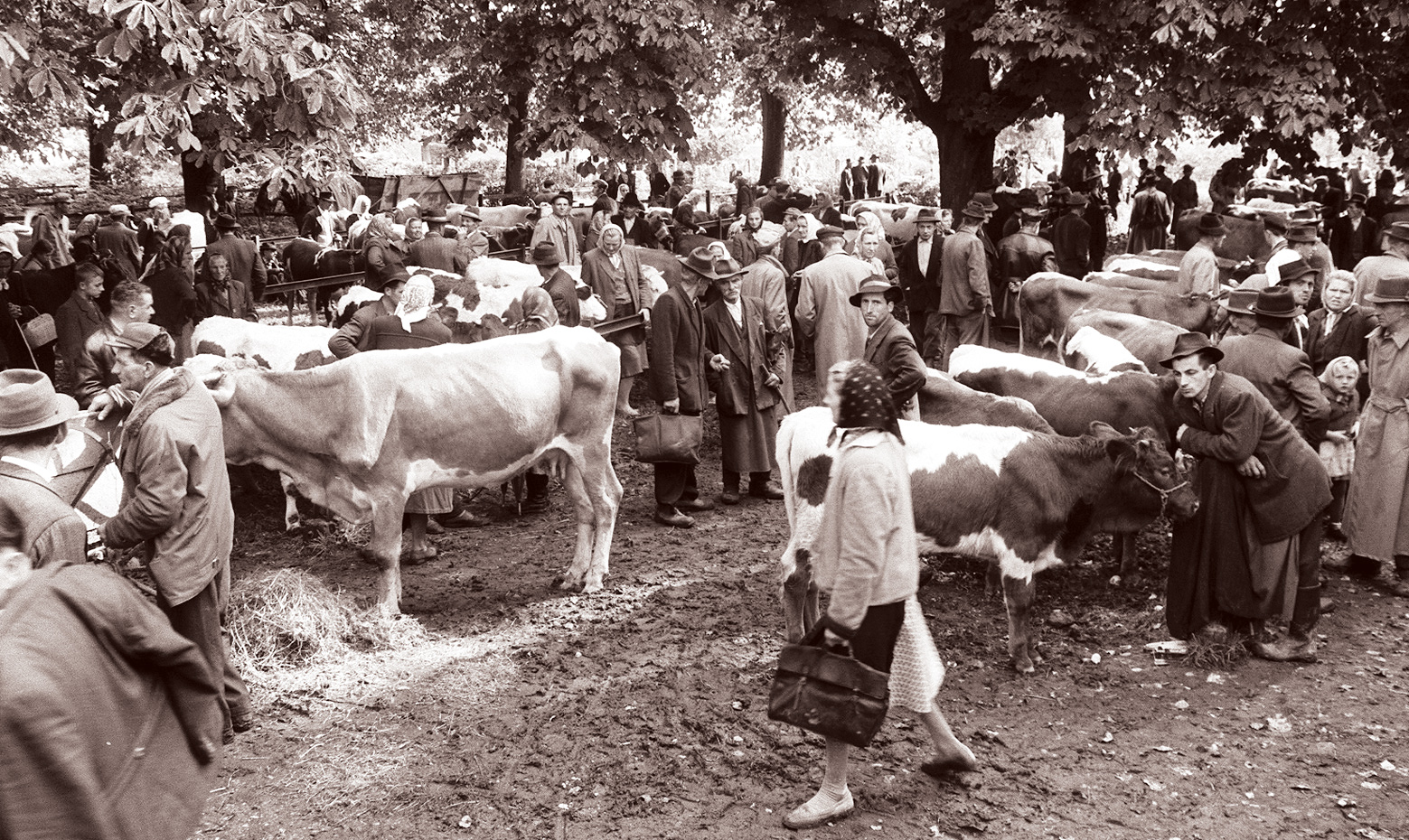 Ptujski plemenski živinski sejem